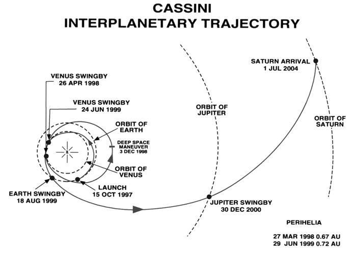 Flugbahn der NASA/ESA-Raumsonde Cassini-Huygens: Nach dem Start an der Erde fliegt sie zweimal an der Venus und einmal an der Erde vorbei sowie einmal am Jupiter, bis sie durch diese Swing-by-Manöver genug kinetische Energie hat, ihr Ziel, den Saturn zu erreichen.